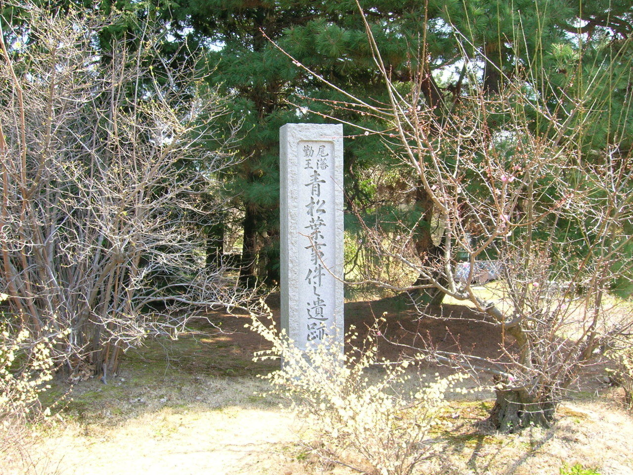 Aomatsuba Incident Monument Loc: Nagoya Castle. Nagoya city, Aichi Prefecture, Japan. ja:「青松葉事件之遺跡」碑 撮影場所 名古屋城